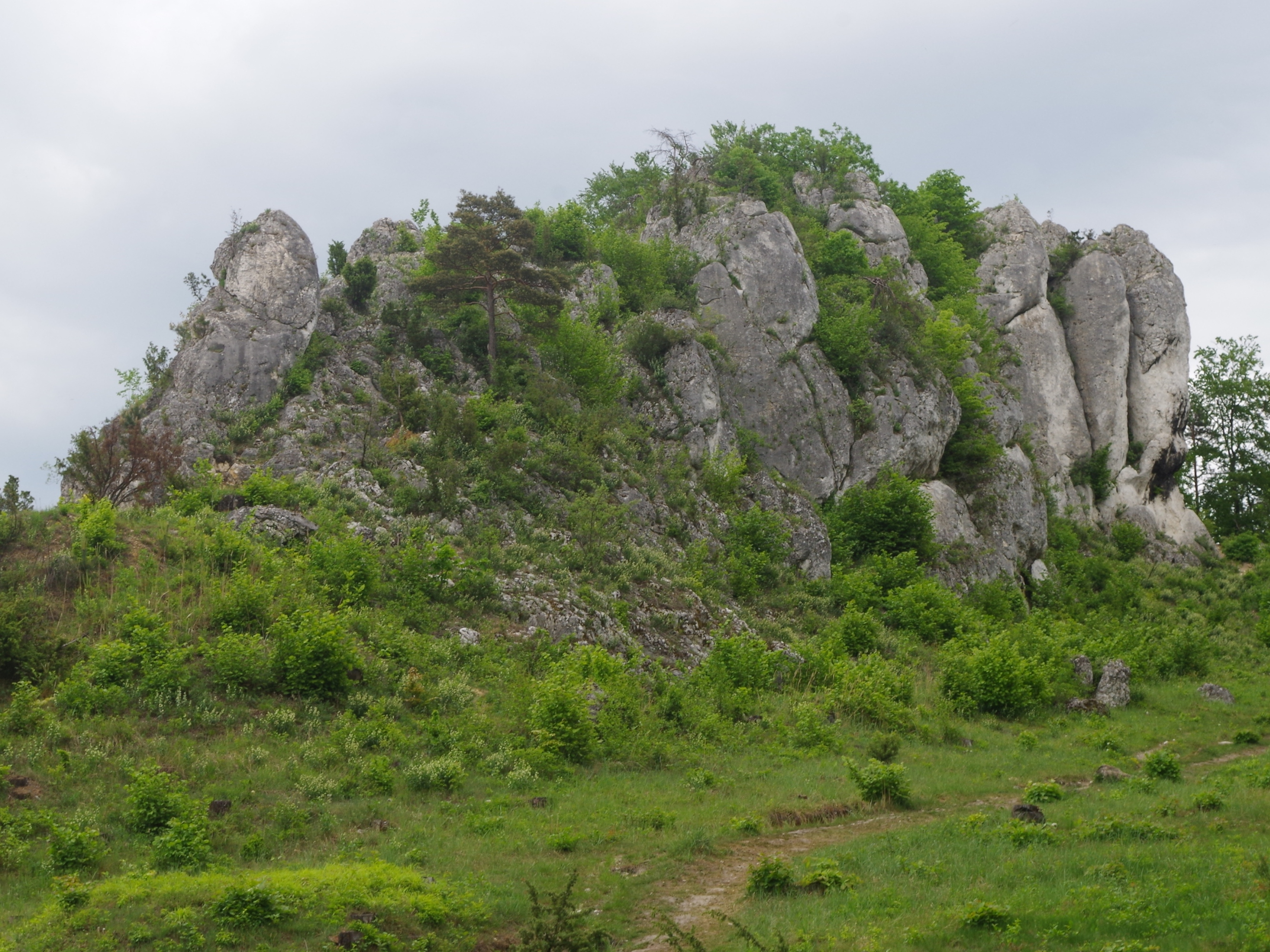 Skały Krucze w Podlesicach